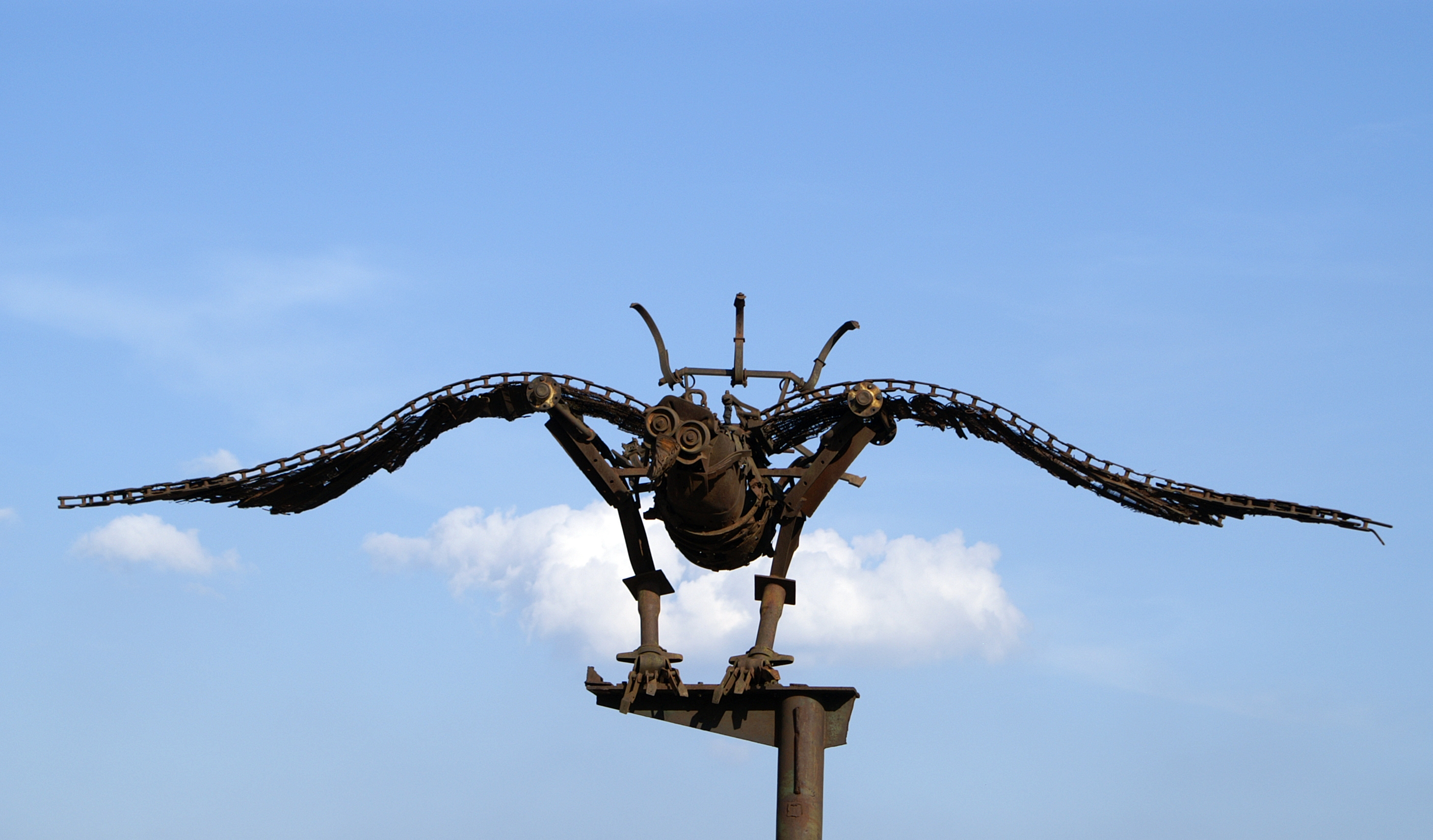 Solarvogel von Odo Rumpf am Kölner Rheinufer (Am Leystapel)